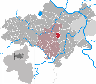 Lonnig in Rhineland-Palatinate - district Mayen-Koblenz